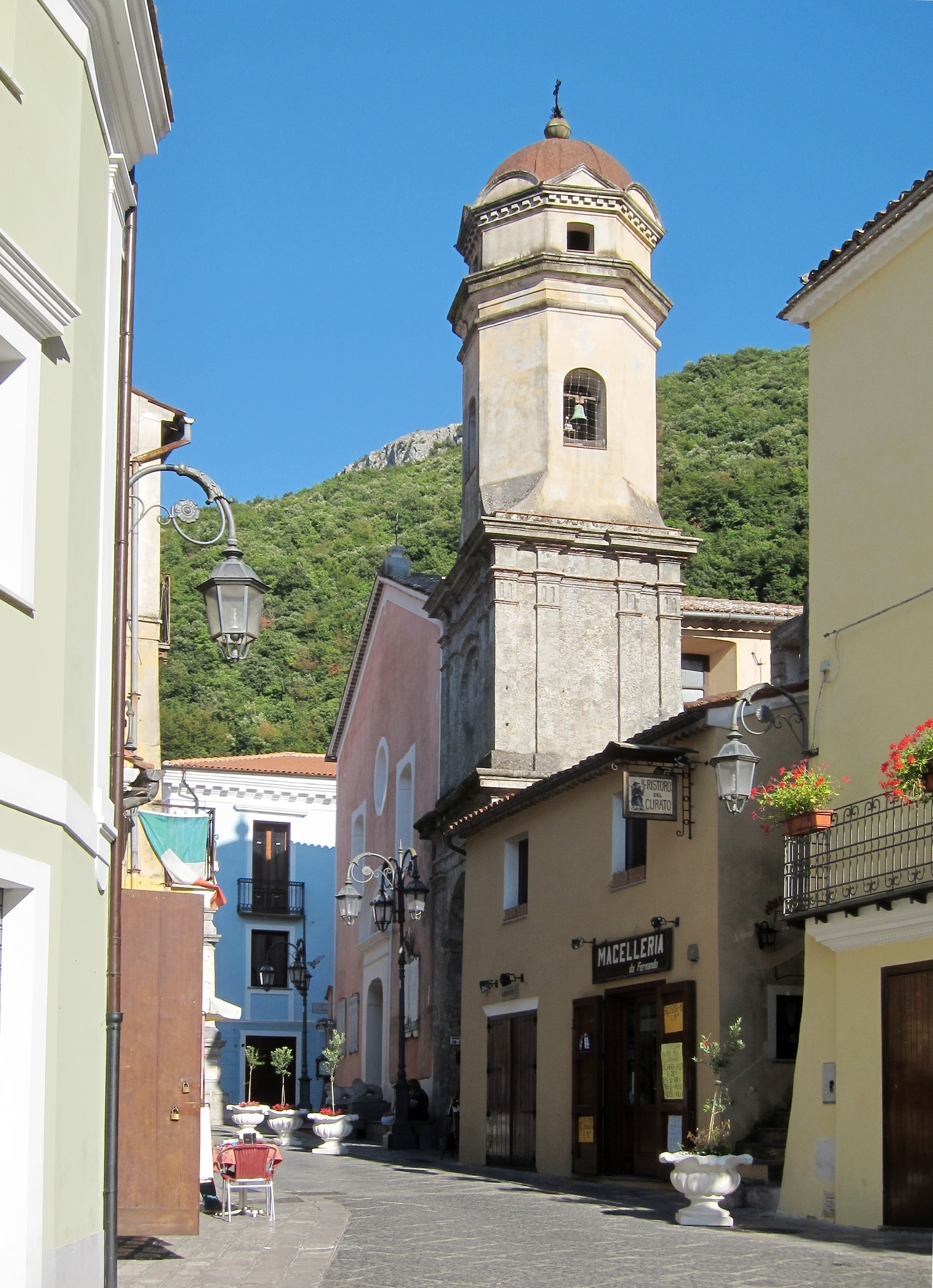 La Chiesa dell'Annunziata à Maratea (Basilicate).